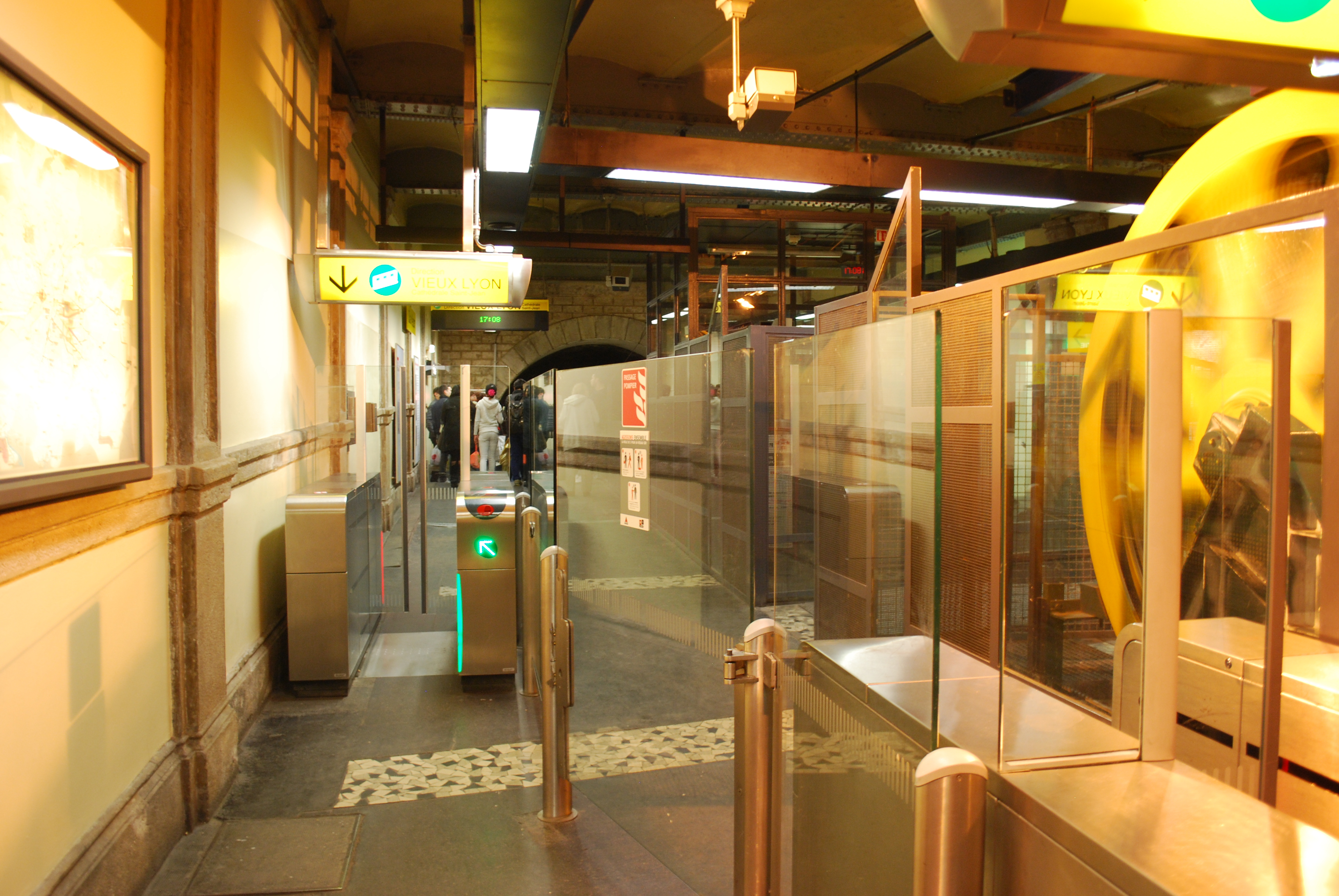 Vue de Lyon.